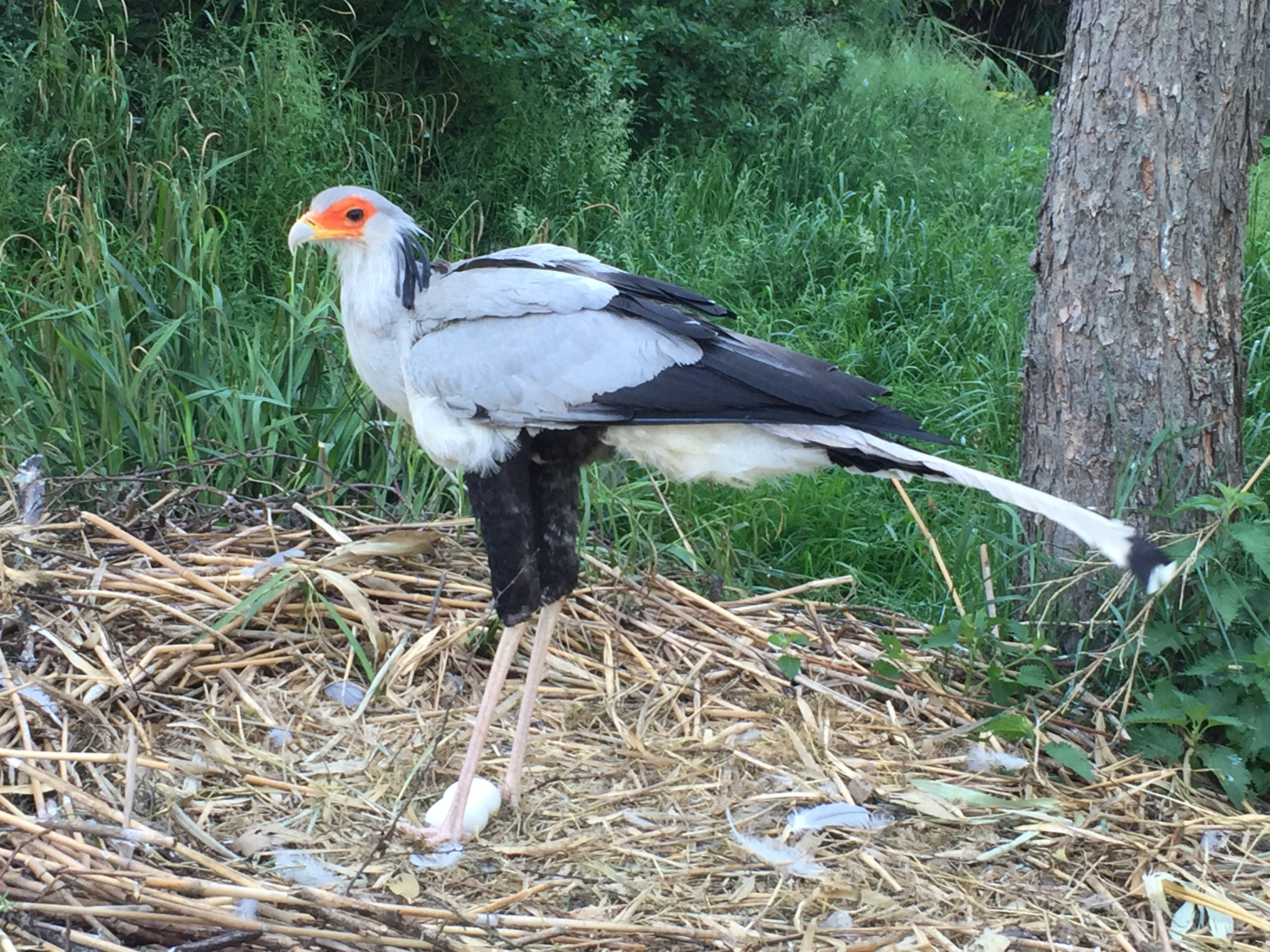 Secretario (Sagittarius serpentarius) en el parque Pairi Daiza (Brugelette, Bélgica). A sus pies se aprecian dos huevos que este ejemplar estaba incubando.